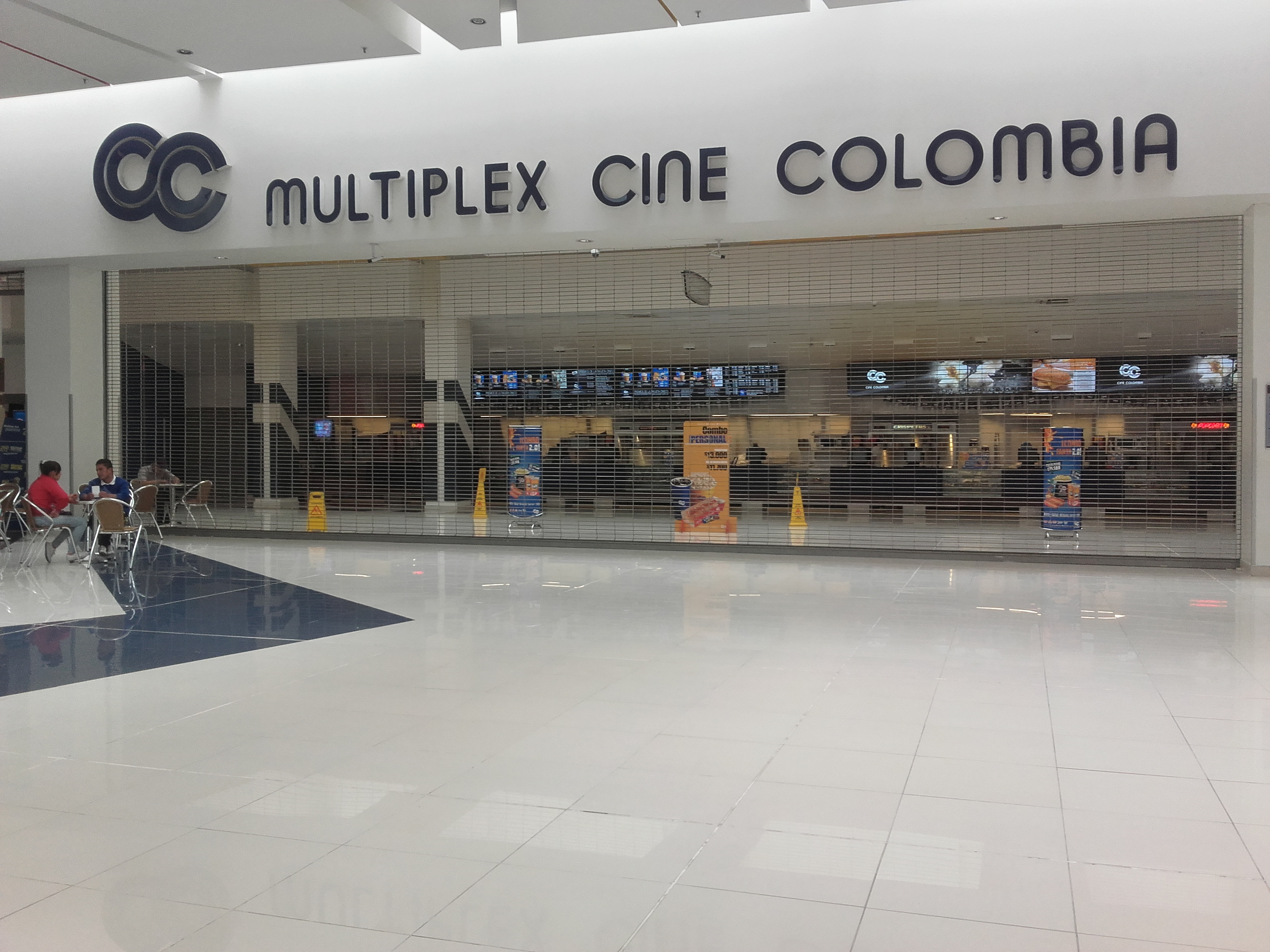 dkmdmfmfmrkrkrk